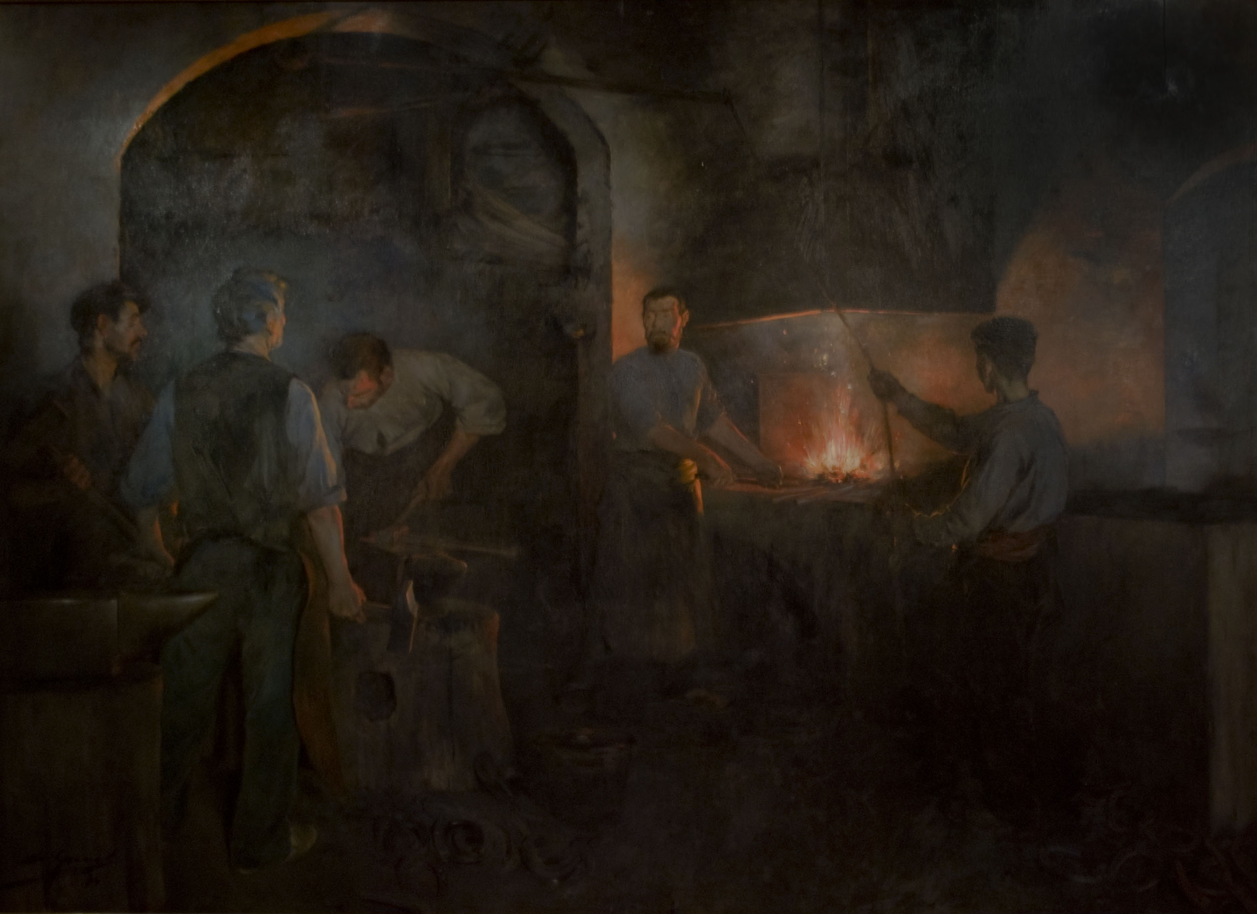 Escena d'interior d'una farga amb cinc homes treballant el ferro pel procediment de la forja, dos d'ells al forn, on es fa l'operació de reduir el mineral, i els altres tres al mall, forjant.